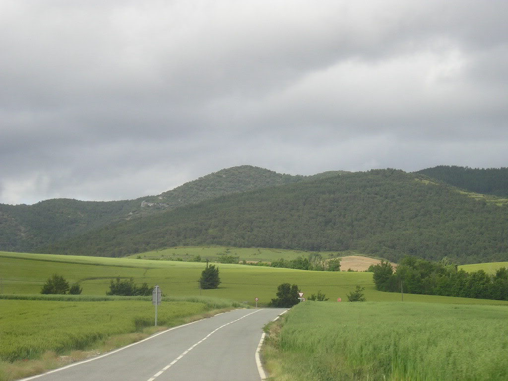 Nafarroako Eguesibar udalerriaren inguruko mendiak.